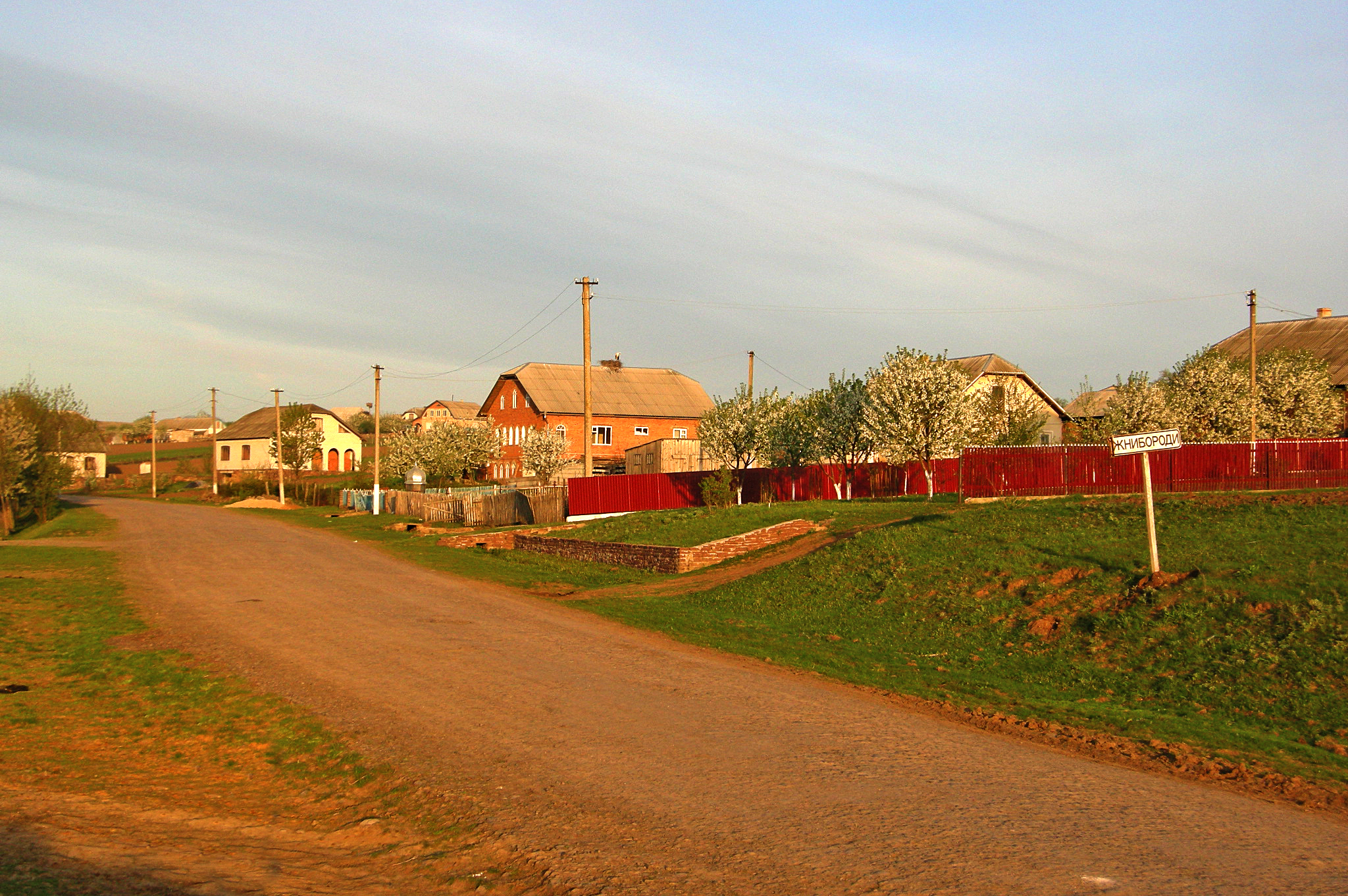 В'їзд у село Жнибороди з боку села Берем'яни (Бучацький район Тернопільської області). Автошлях С200320 «Берем'яни — Дуліби».